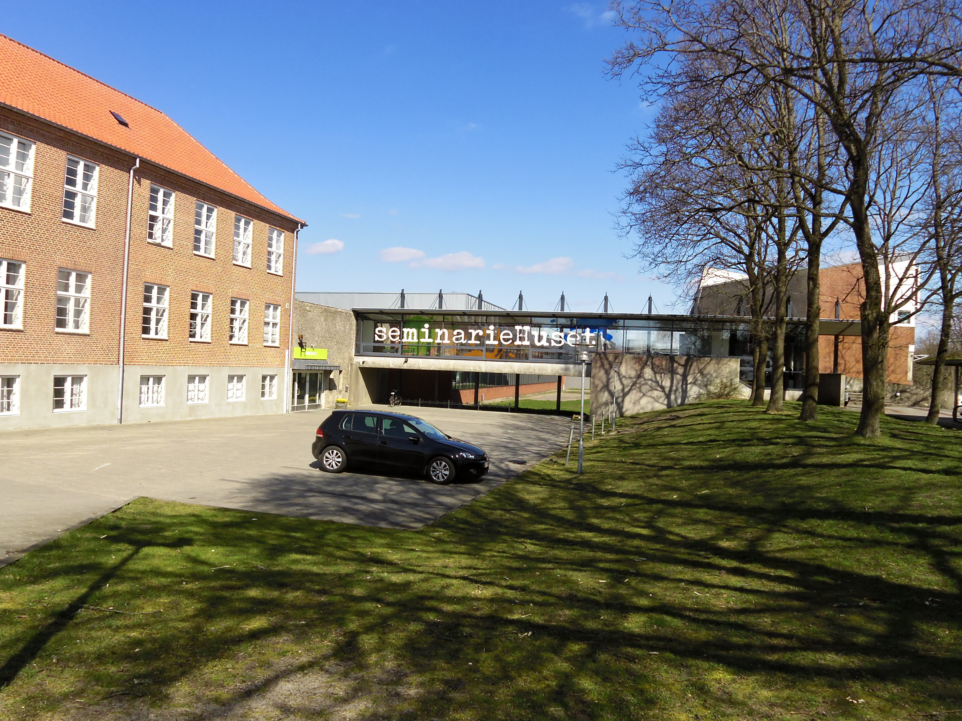 Seminariehuset i Ribe